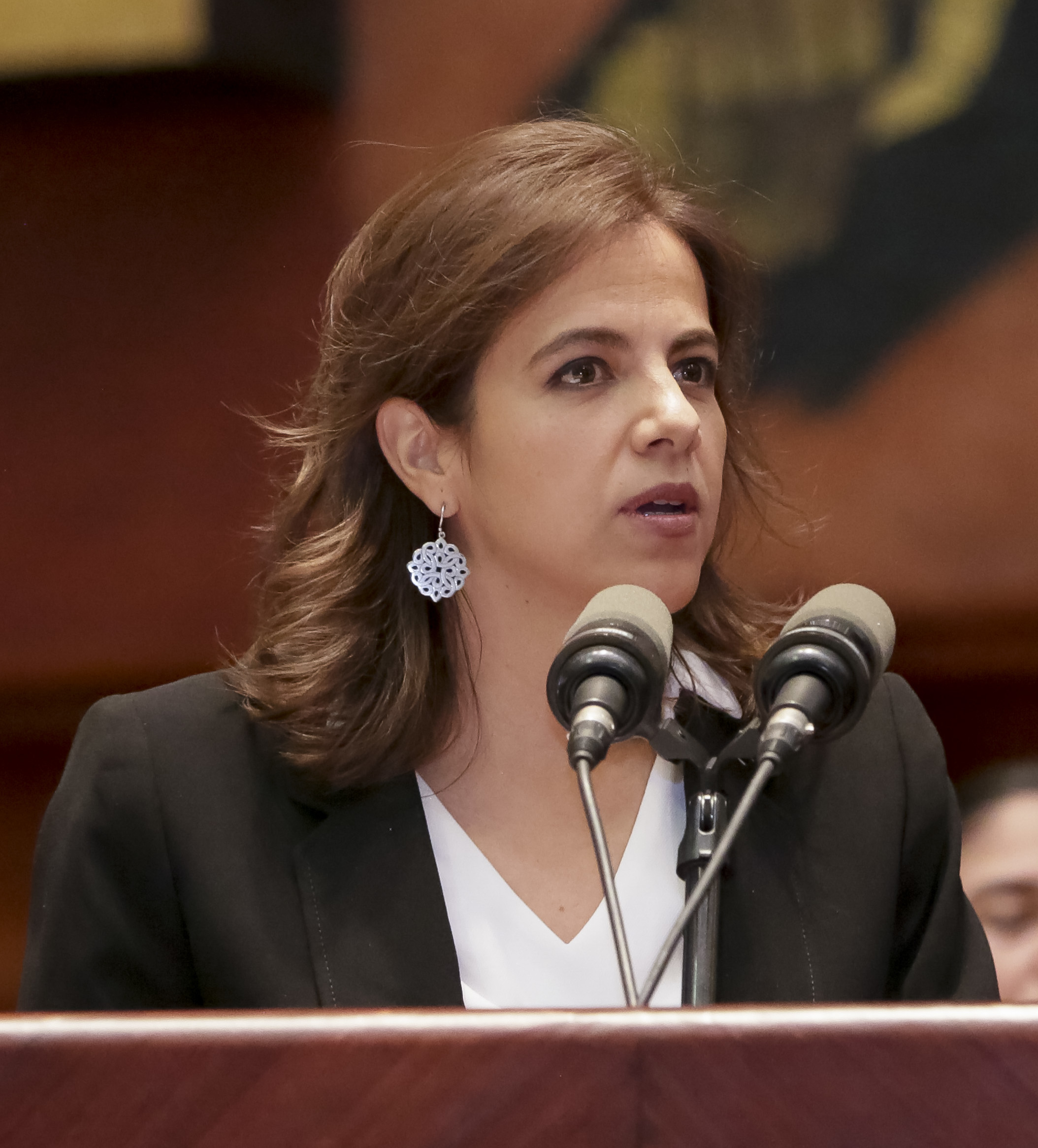 Quito 29 Octubre 2018. -Comparecencia de las autoridades descritas en la resolución del Pleno de la Asamblea Nacional adoptada el 23 de octubre de 2018, a fin de que brinden información sobre los hechos relativos al señor Fernando Alvarado Espinel, ex Secretario de Comunicación. -Foto: Fernando Lagla / Asamblea Nacional Quito 29 Octubre 2018. -Comparecencia de las autoridades descritas en la resolución del Pleno de la Asamblea Nacional adoptada el 23 de octubre de 2018, a fin de que brinden información sobre los hechos relativos al señor Fernando Alvarado Espinel, ex Secretario de Comunicación. -Foto: Fernando Lagla / Asamblea Nacional